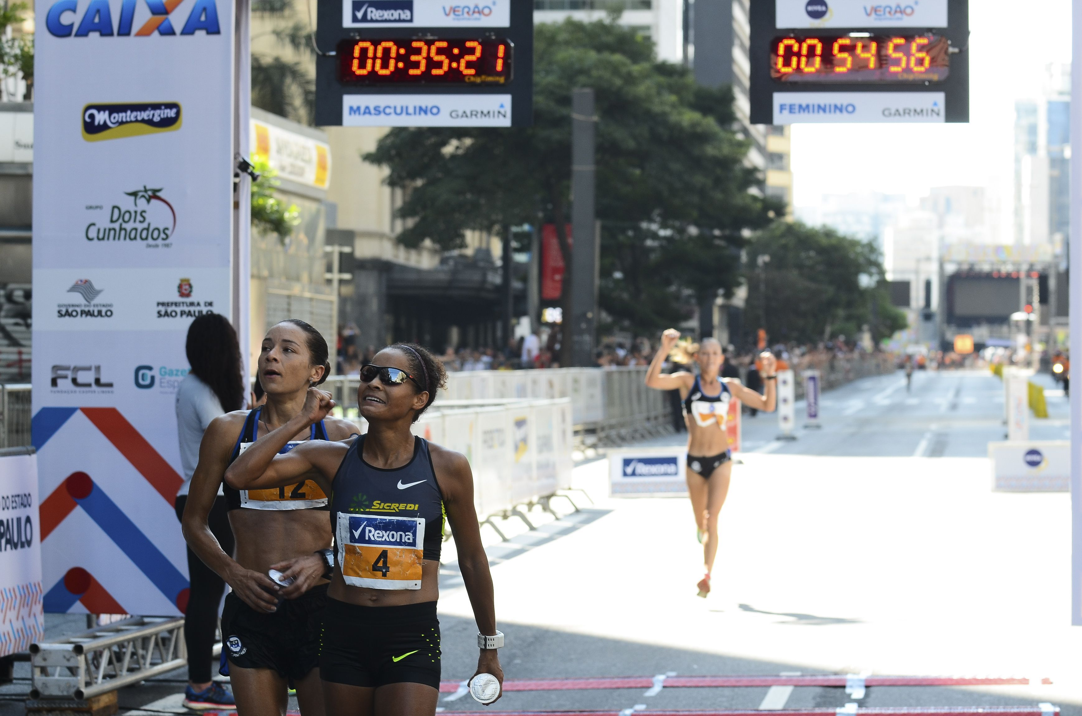 Tatiele Roberta de Carvalho, na sétima colocação, faz o melhor tempo entre as brasileiras na 92ª Corrida Internacional de São Silvestre, na Avenida Paulista (Rovena Rosa/Agência Brasil)